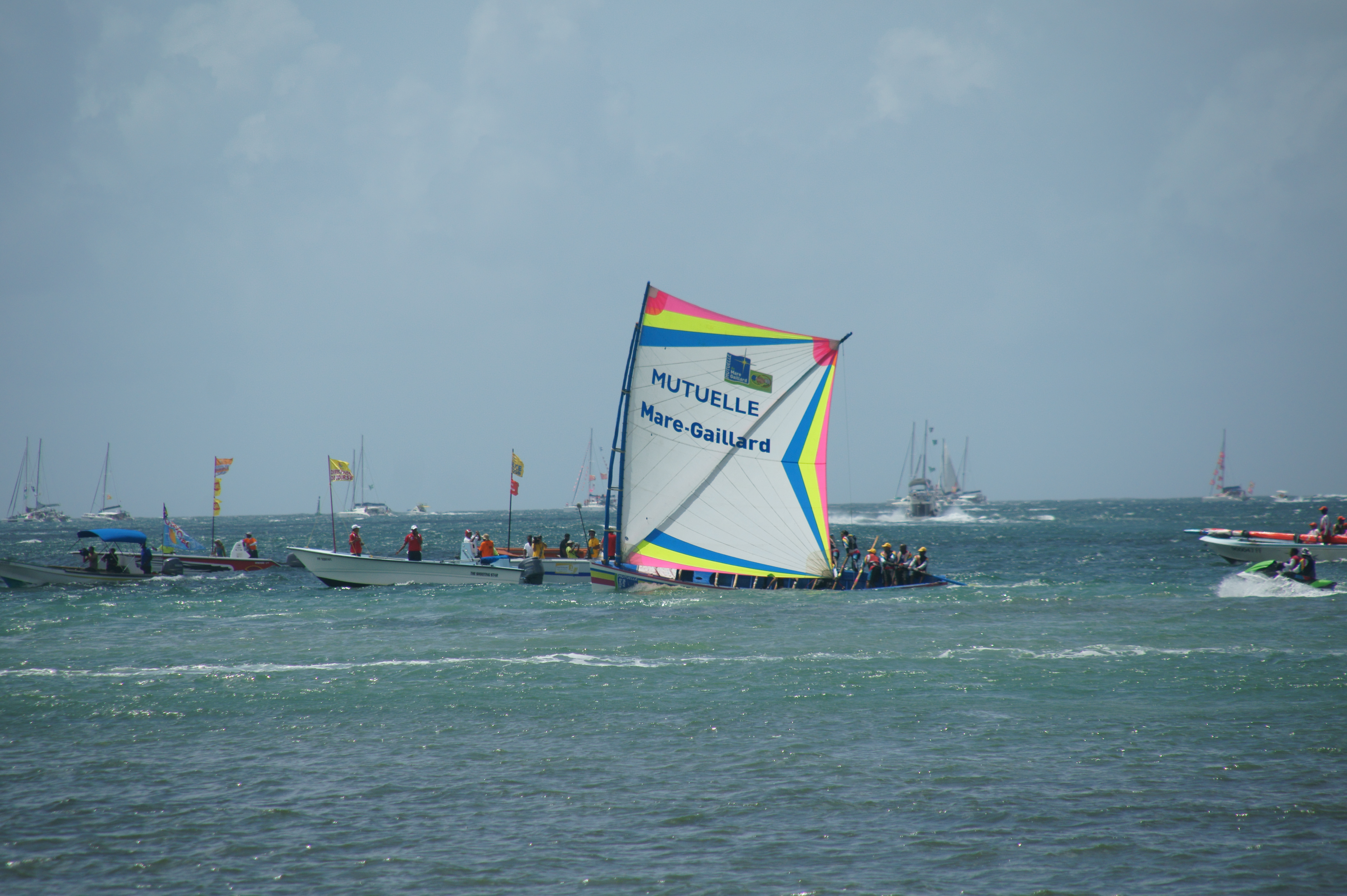 Tour de la Martinique des yoles 2011